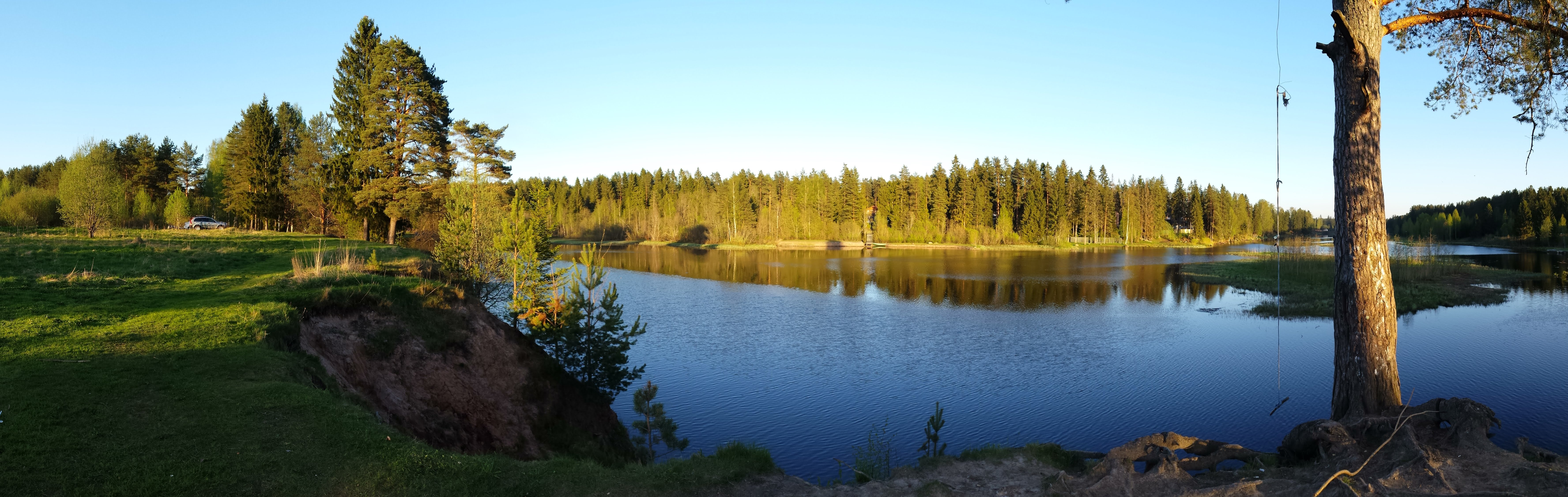 Поселок Выроица. Вид с Титова поля на реку Оредеж. Справа видна т.н. "тарзанка".